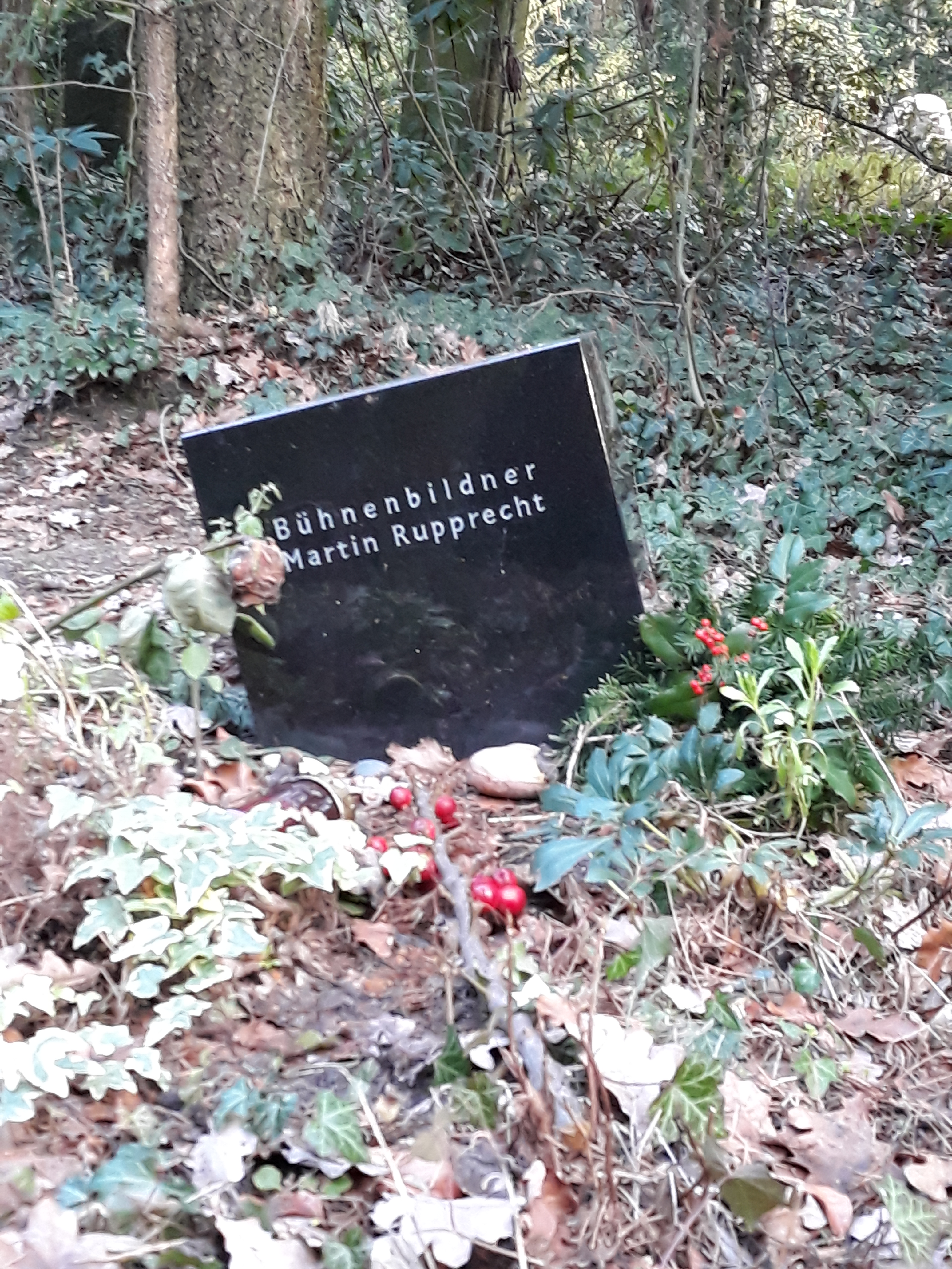 Das Grab des deutschen Bühnenbildners Martin Rupprecht auf dem Parkfriedhof Lichterfelde in Berlin.